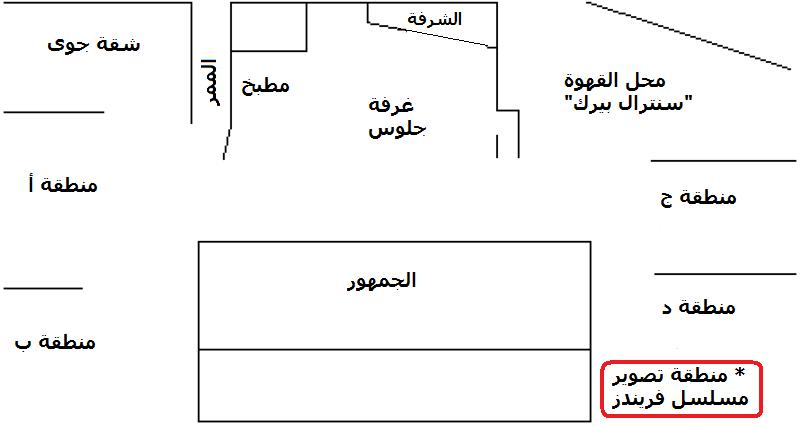 منطقة تصوير مسلسل فريندز.